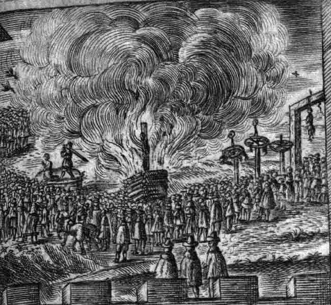 detail: Titelkupfer des 'Tractatus synopt. de retractu consanguinitatis et Responsum Iuris de Processu contra sagas'